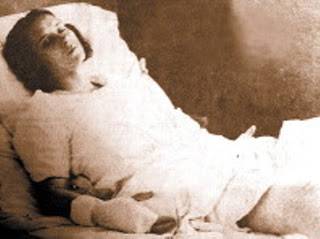 La primera fotografía de Claudia en el hospital general de la ciudad de Querétaro